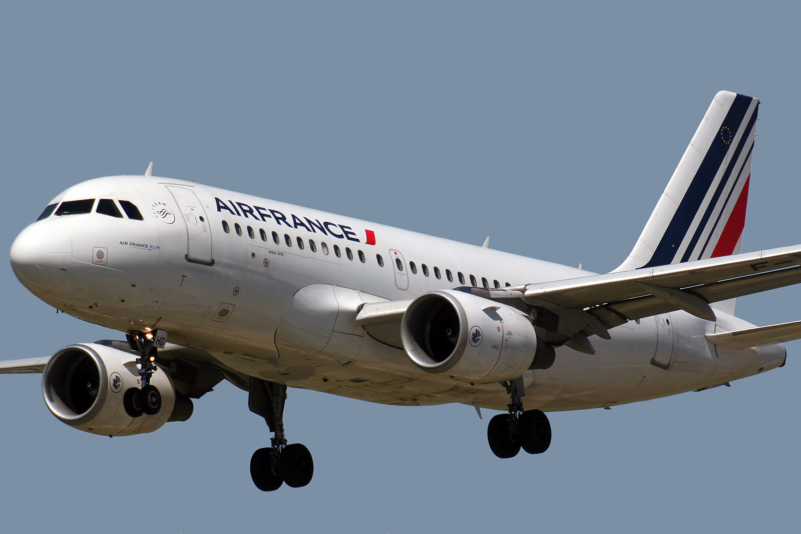 Barcelona El Prat (LEBL/BCN) Airport